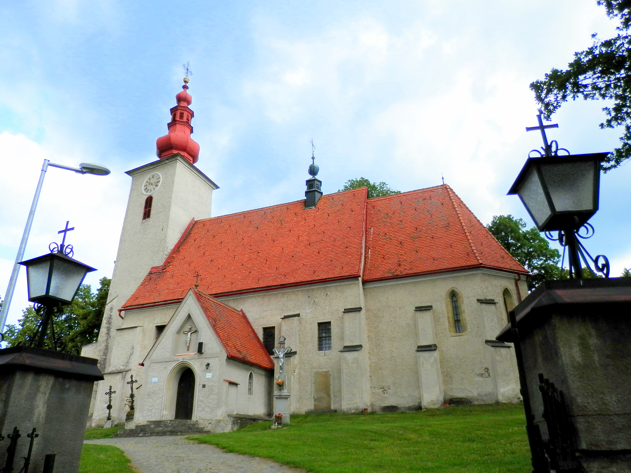 Pútnický, rímskokatolícky kostol svätého Vojtecha, doba vzniku rok 1384, prevládajúci sloh gotický. Obec Gaboltov okres Bardejov.